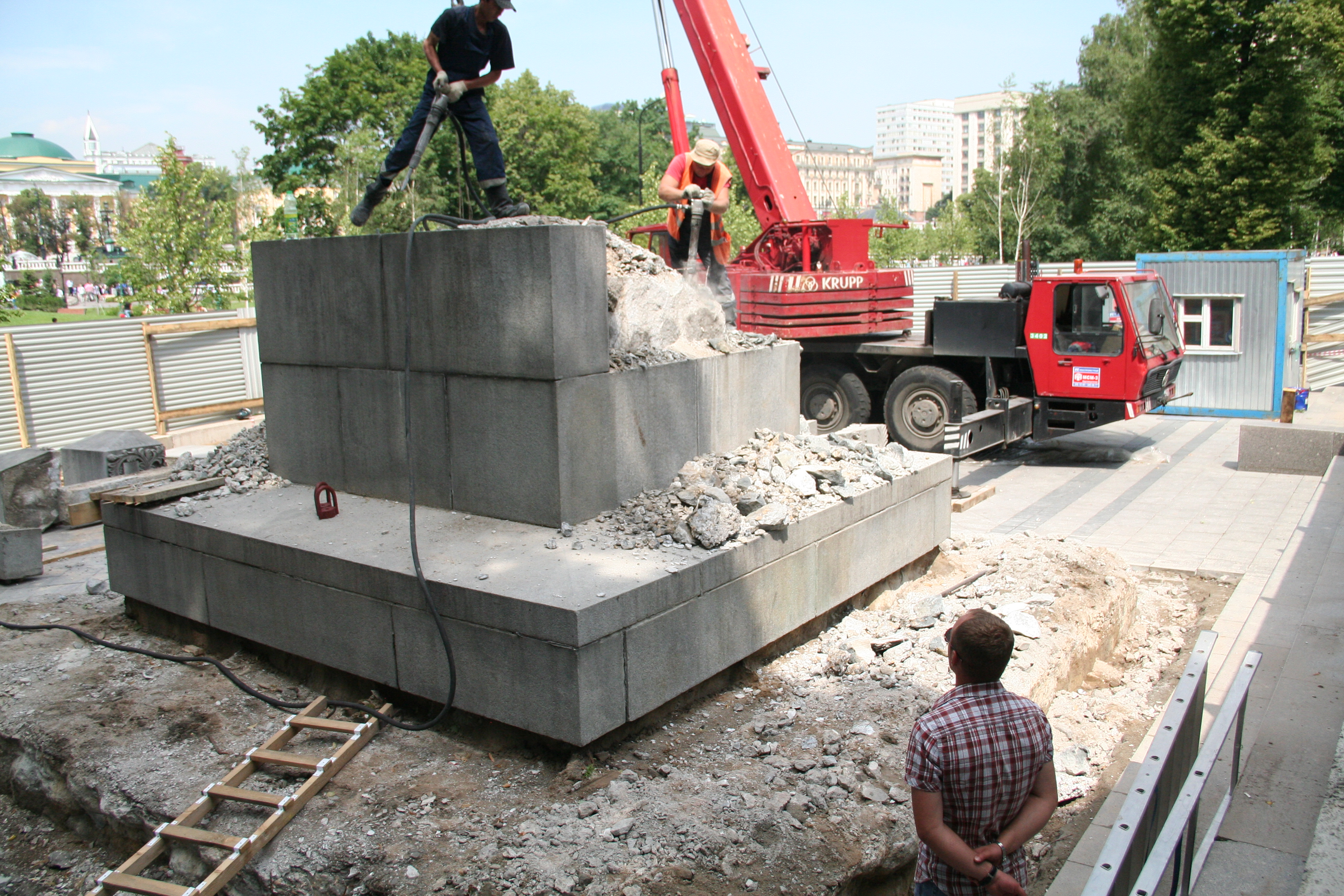 Демонтаж памятника-обелиска в Александровском саду в Москве. 2013